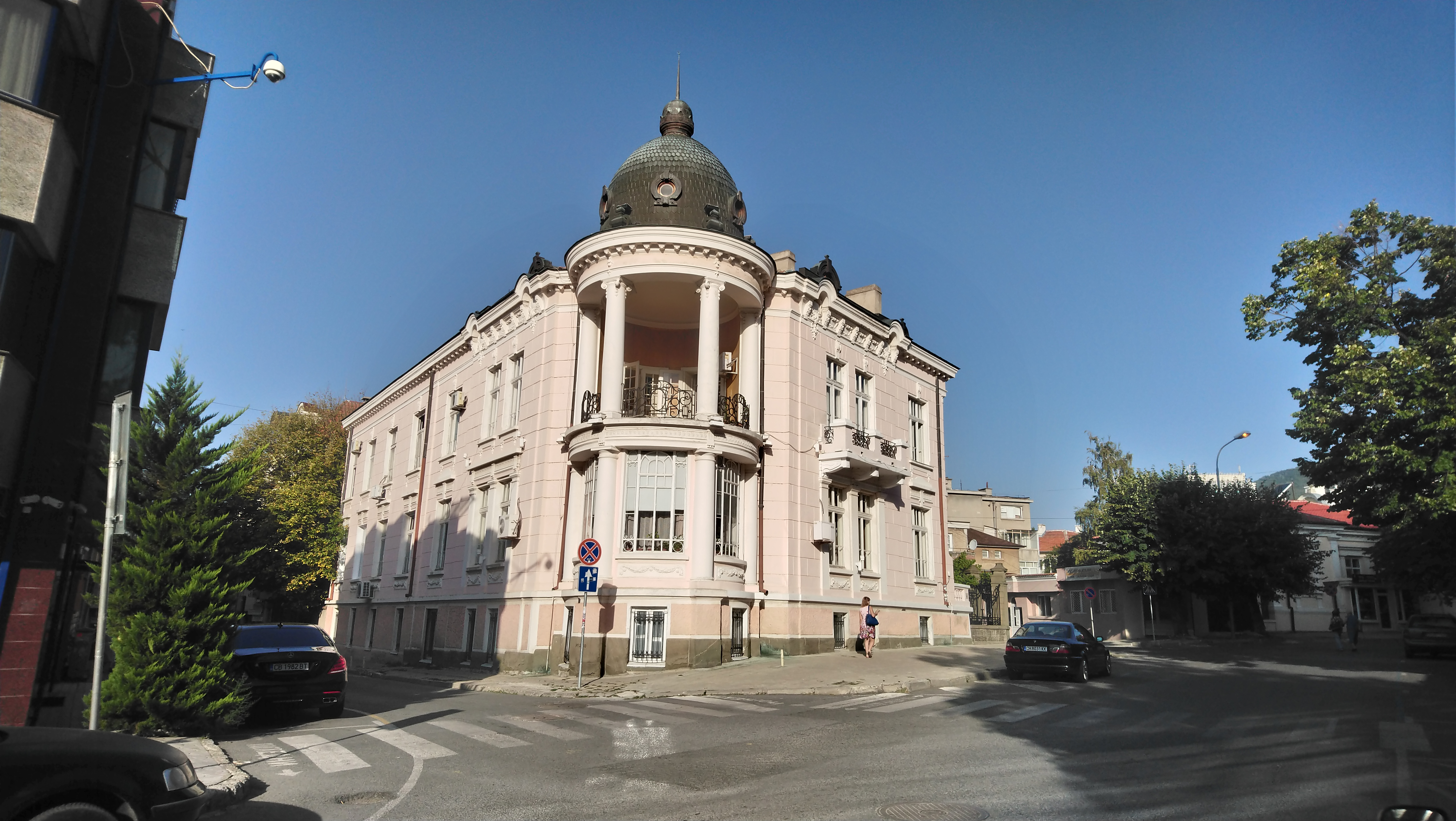 Сградата на Регионална библиотека „Сава Доброплодни“ в Сливен.